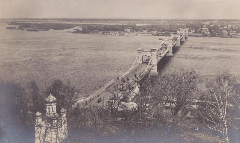 Николаевский цепной мост в Киеве, открытка